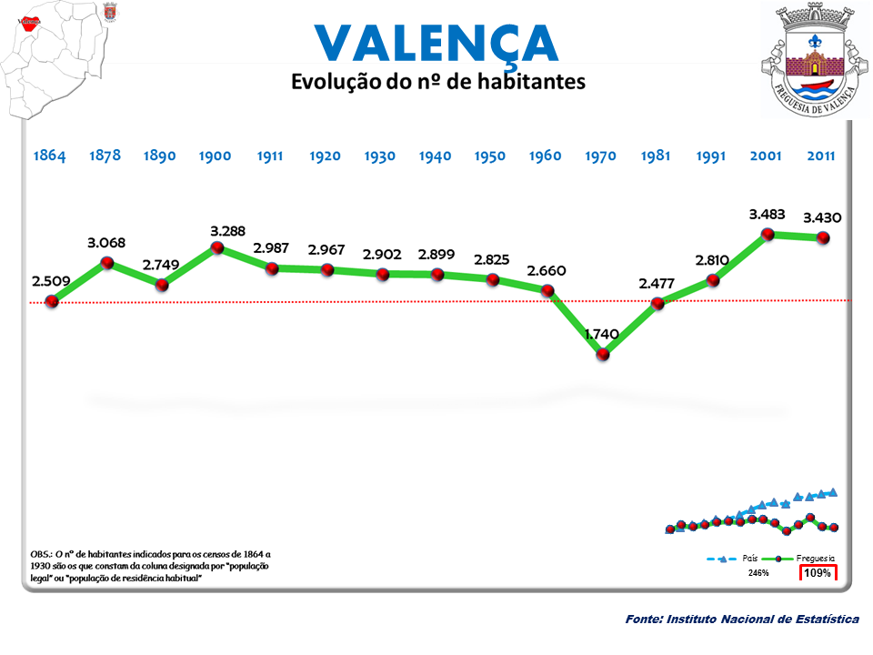 Censos 1864/2011